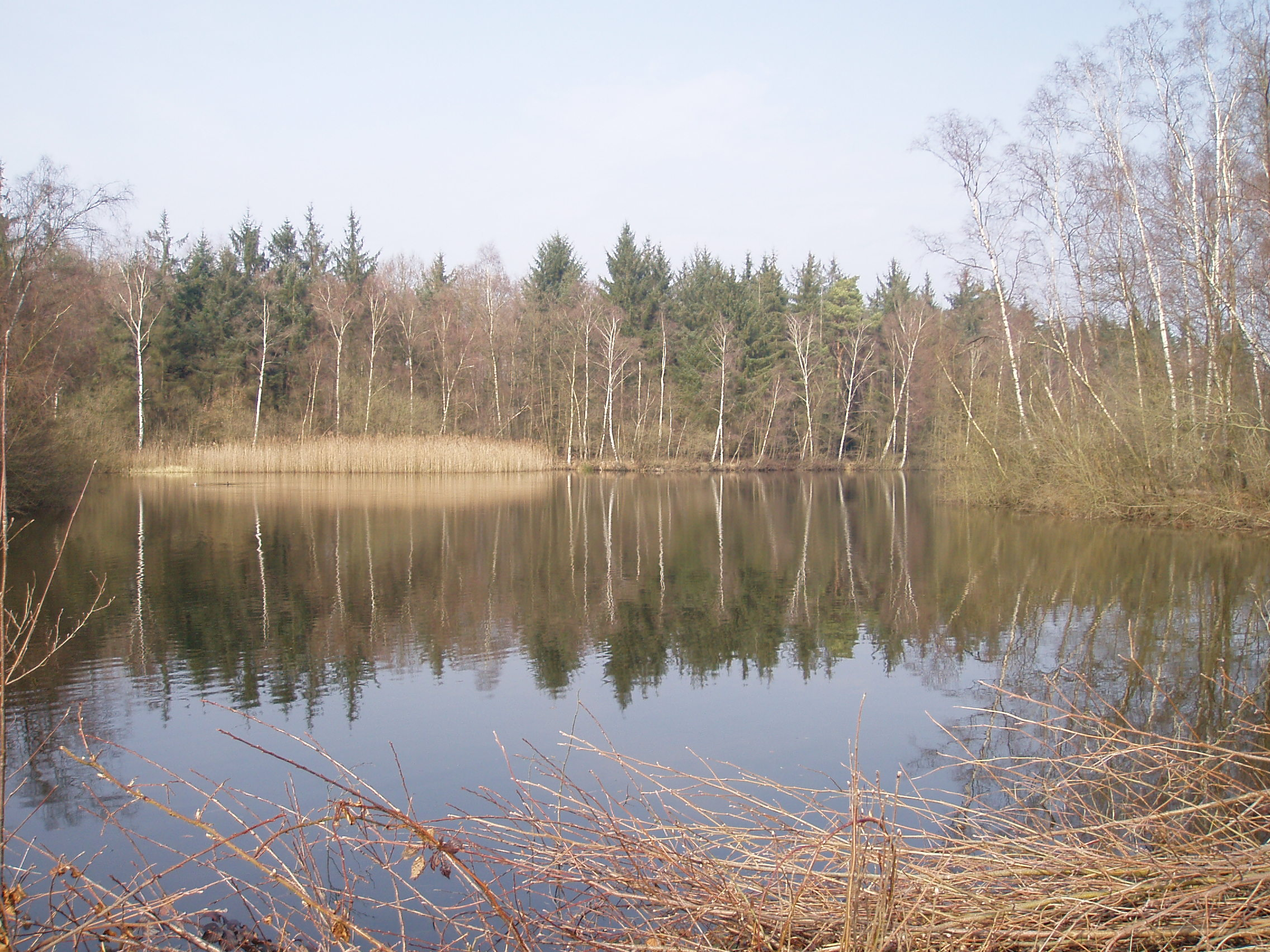 De Wijers